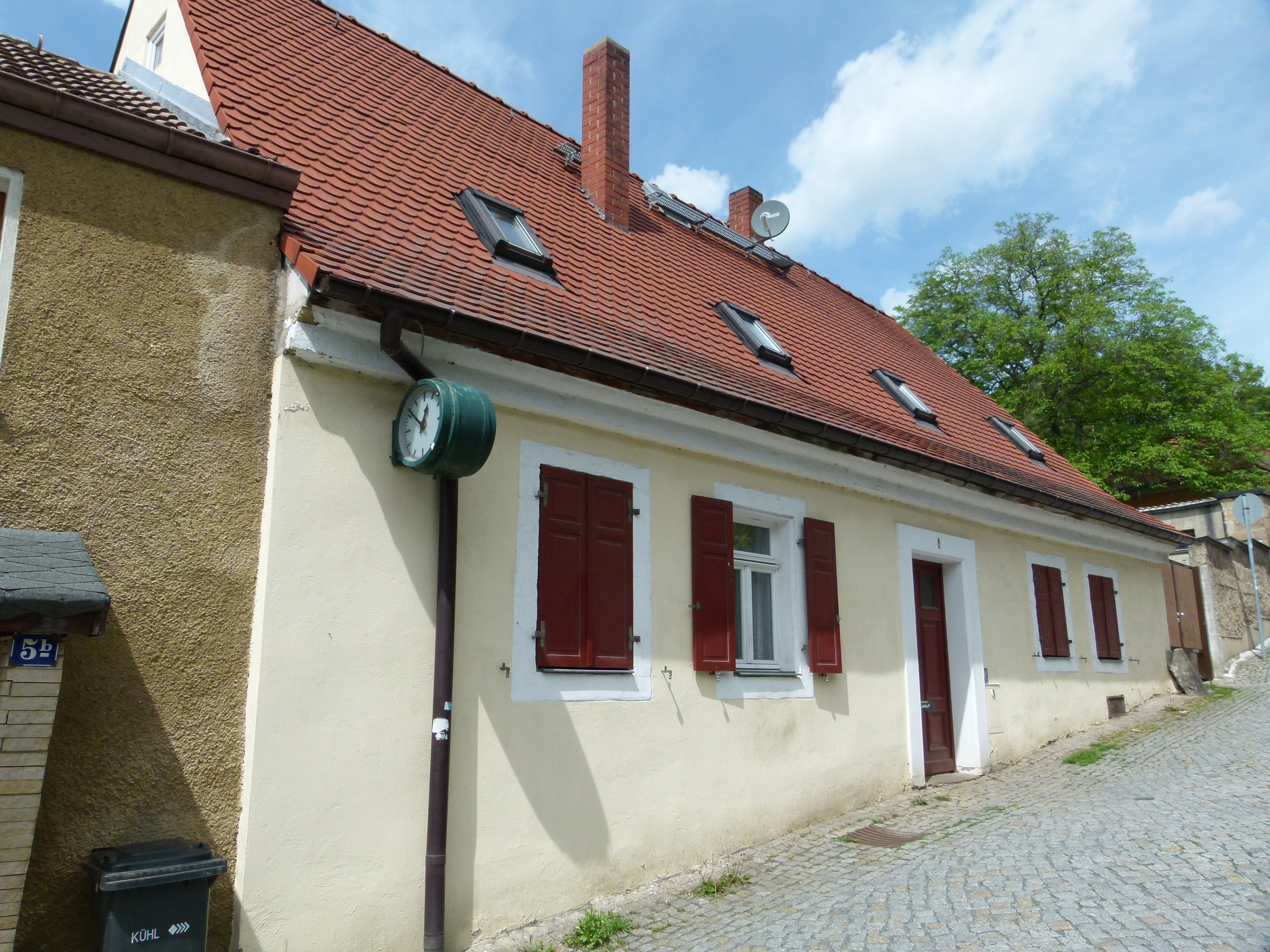 Denkmalgeschütztes Haus, Am Hausberg 6, Pirna, Sachsen